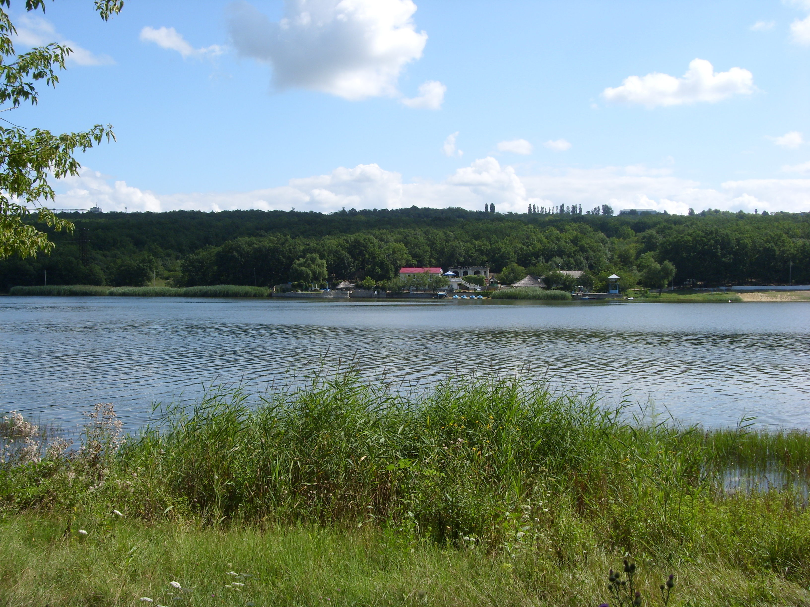 Городское озеро г. Оргеев